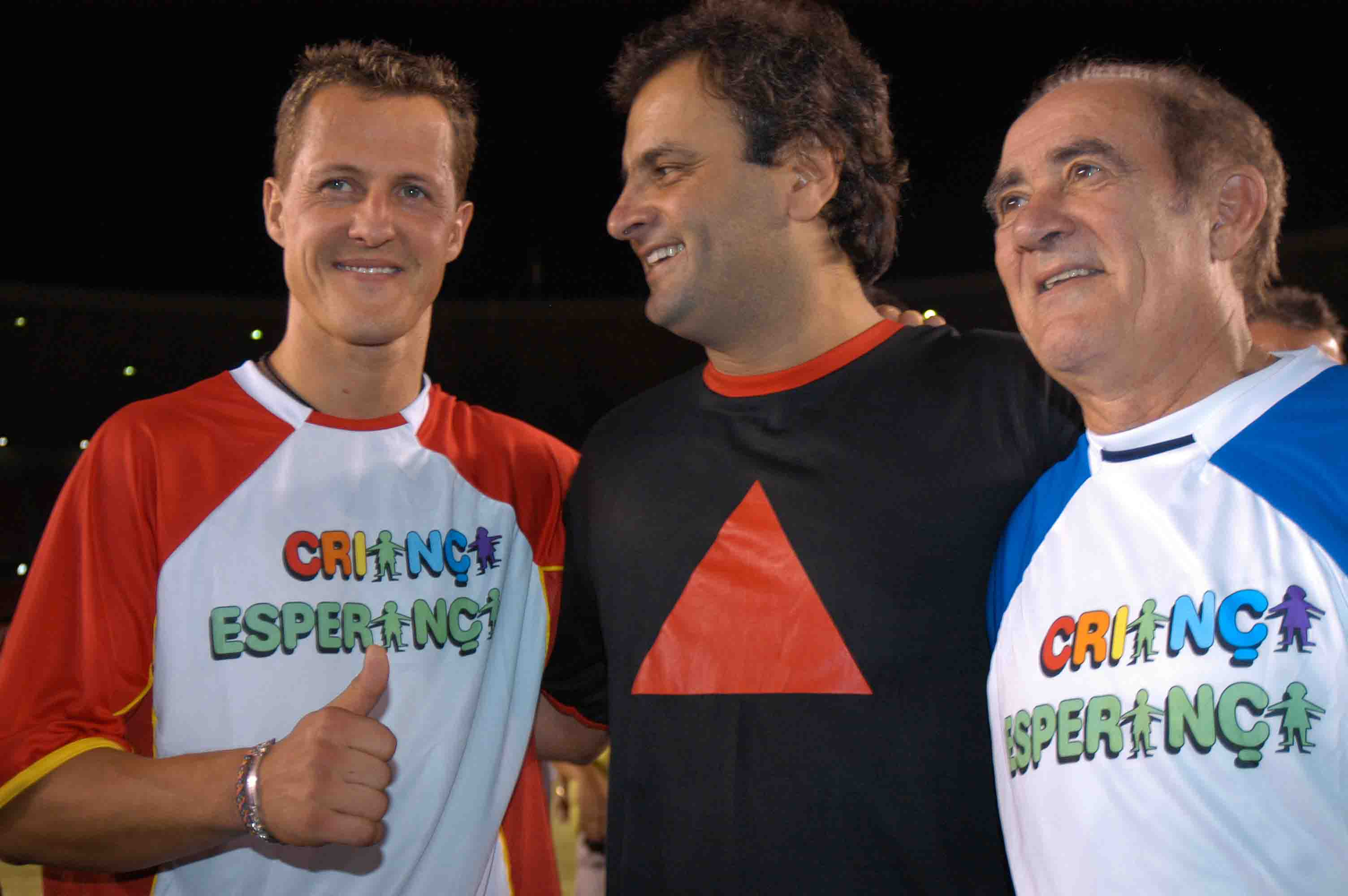 O governador Aécio Neves participa, dentro das comemorações do 40º aniversário do Mineirão, de uma partida beneficente em prol do Projeto Criança Esperança. O evento, promovido pelo Governo do Estado, Fiat, Unicef e Rede Globo, reúne o heptacampeão mundial de Fórmula 1, Michael Schumacher; o humorista Renato Aragão; atletas de diversas modalidades esportivas; cantores e artistas de renome nacional.